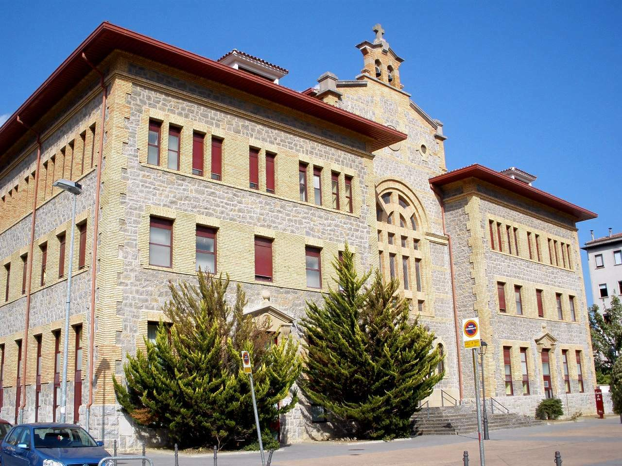 Iglesia de San Blas (Burlada, Navarra)